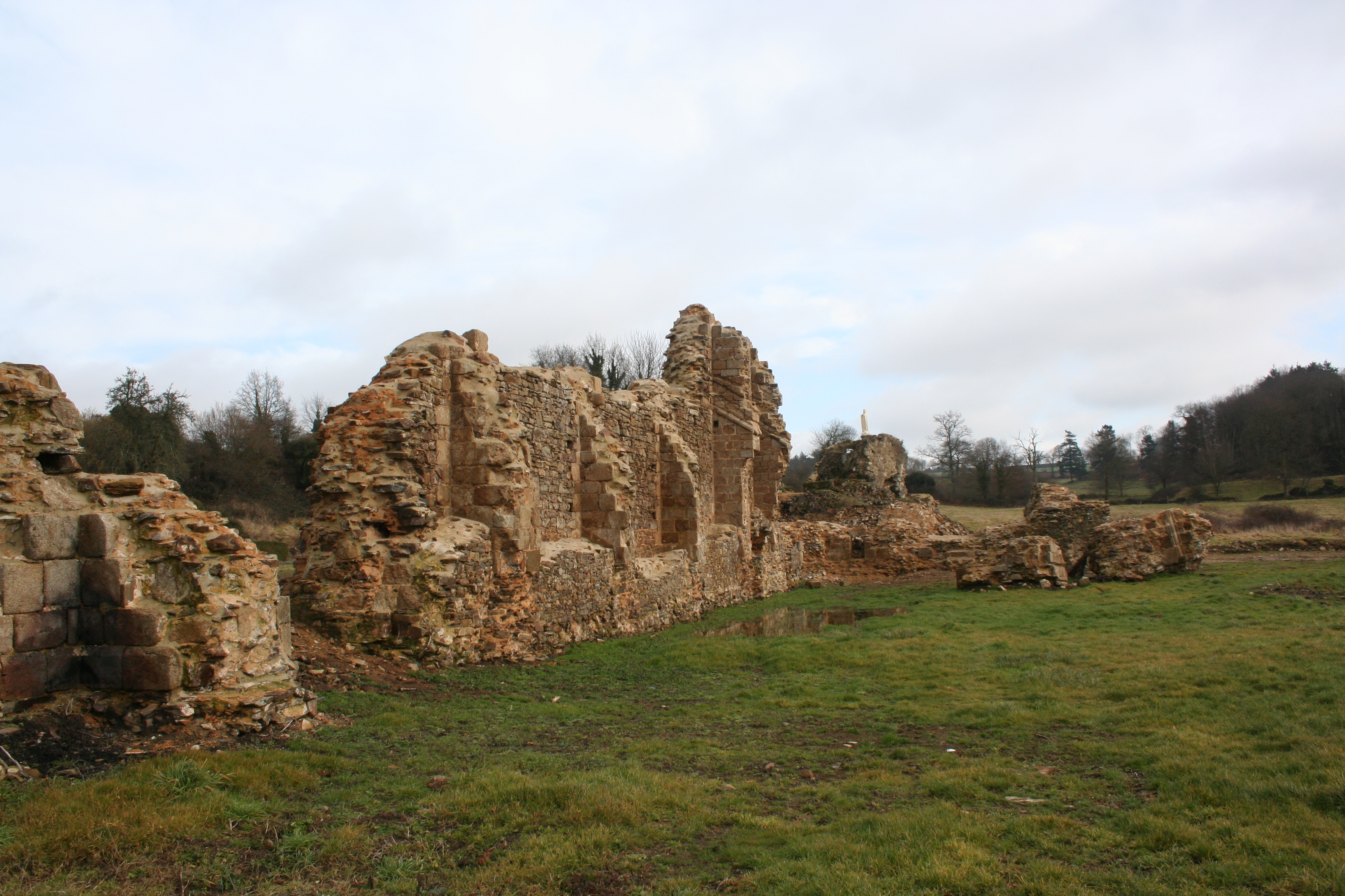 Les contreforts de l'église vue depuis l'hôtellerie. Vue des ruines de l'abbaye de savigny le vieux, manche, france